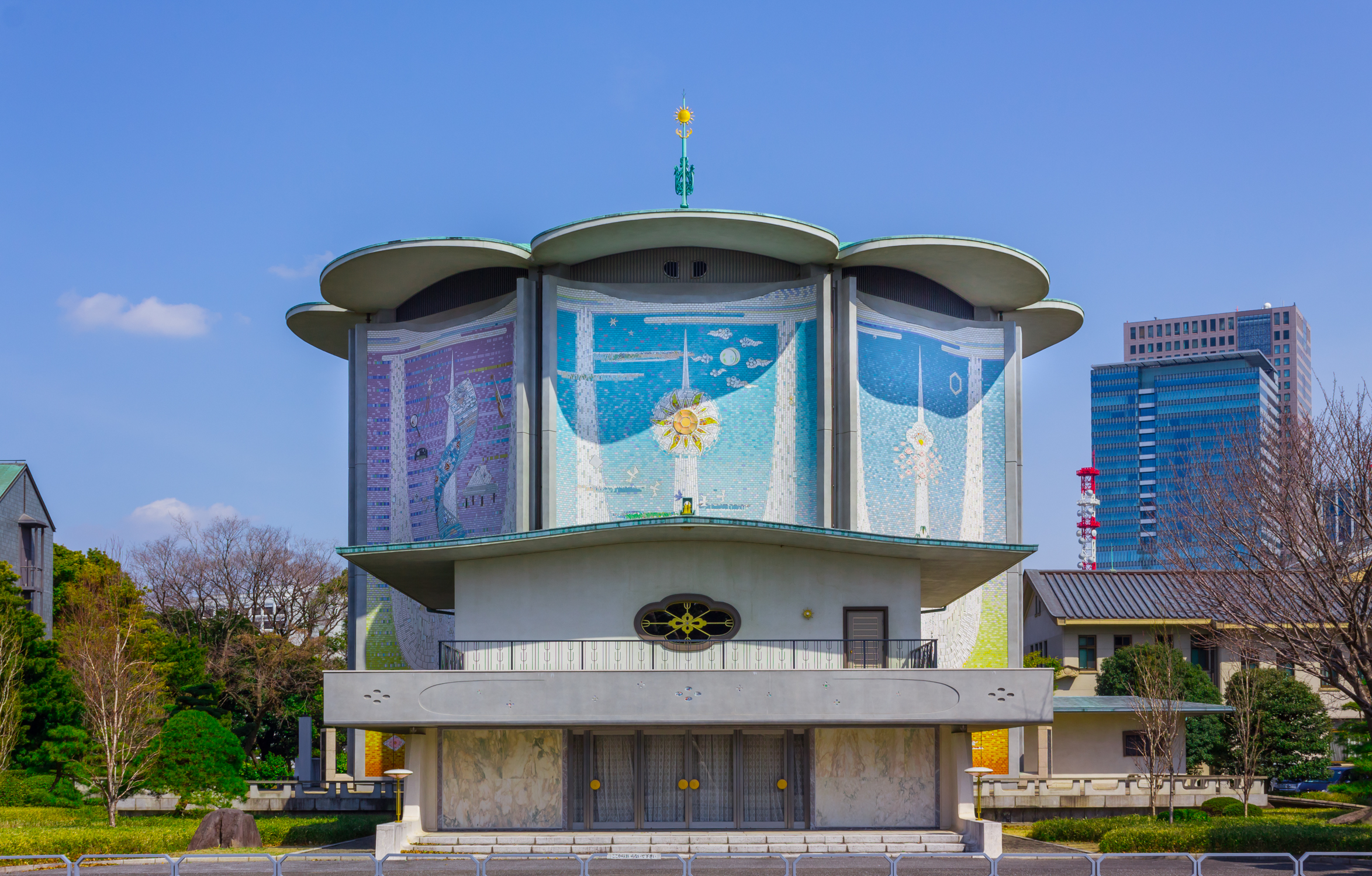 桃華楽堂(皇居東御苑内・東京都千代田区）